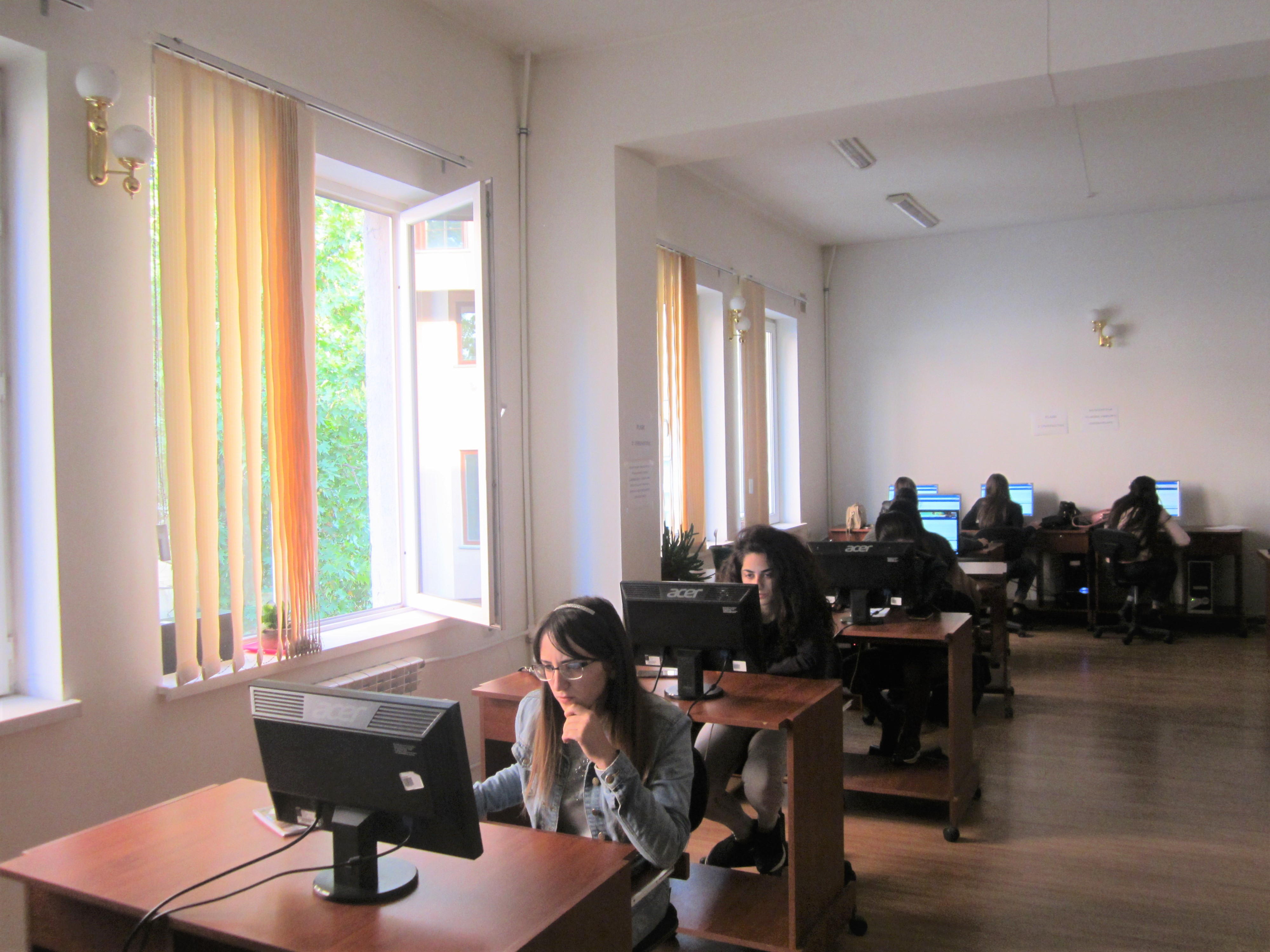 ԵՊԼՀ գրադարանի համակարգչային ընթերցասրահ